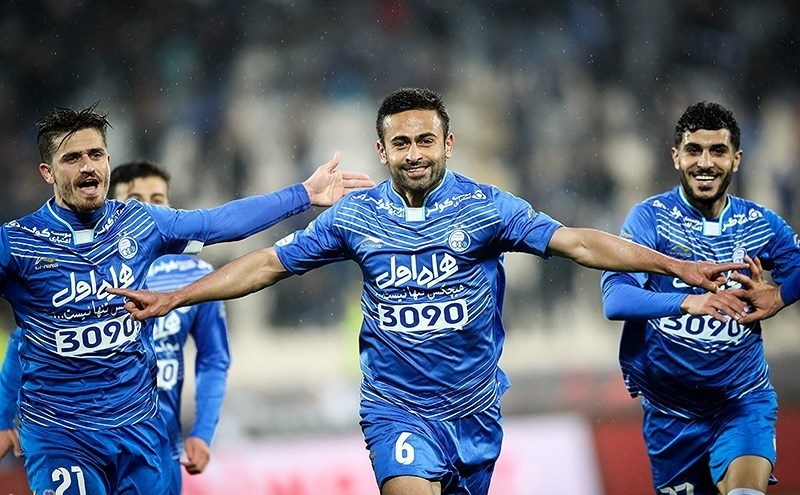 دیدار تیم های فوتبال استقلال و پیکان